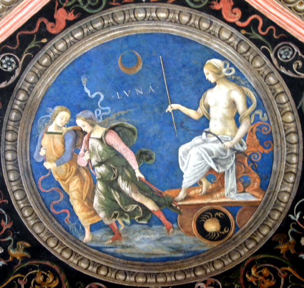 Pietro Perugino, volta del Collegio del Cambio: affresco astrologico della Luna (Diana)